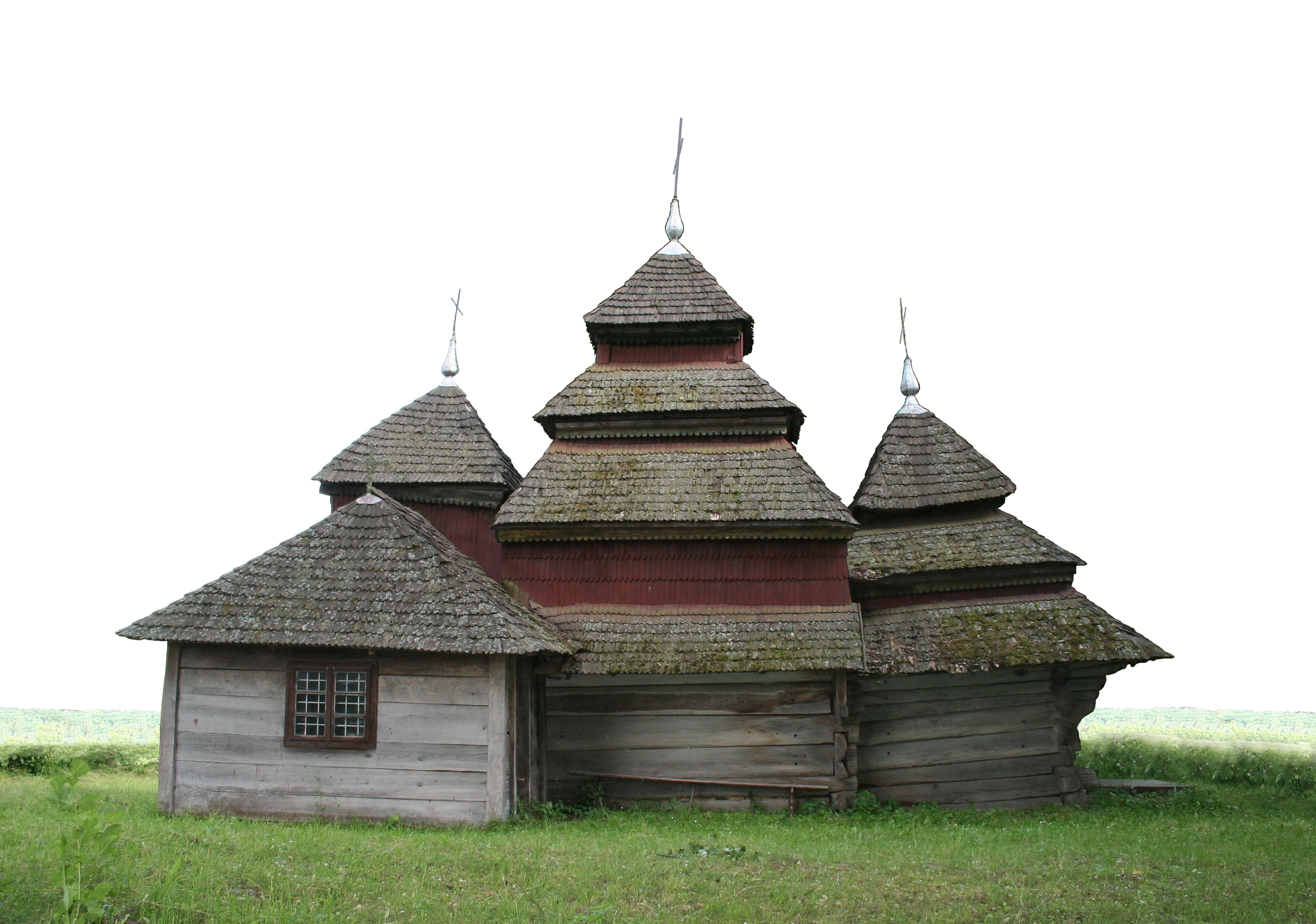 Україна Львiвщина, Пустомитiвський р-он, с. Кугаїв, Богоявлення Господнього 1693 р. (16)